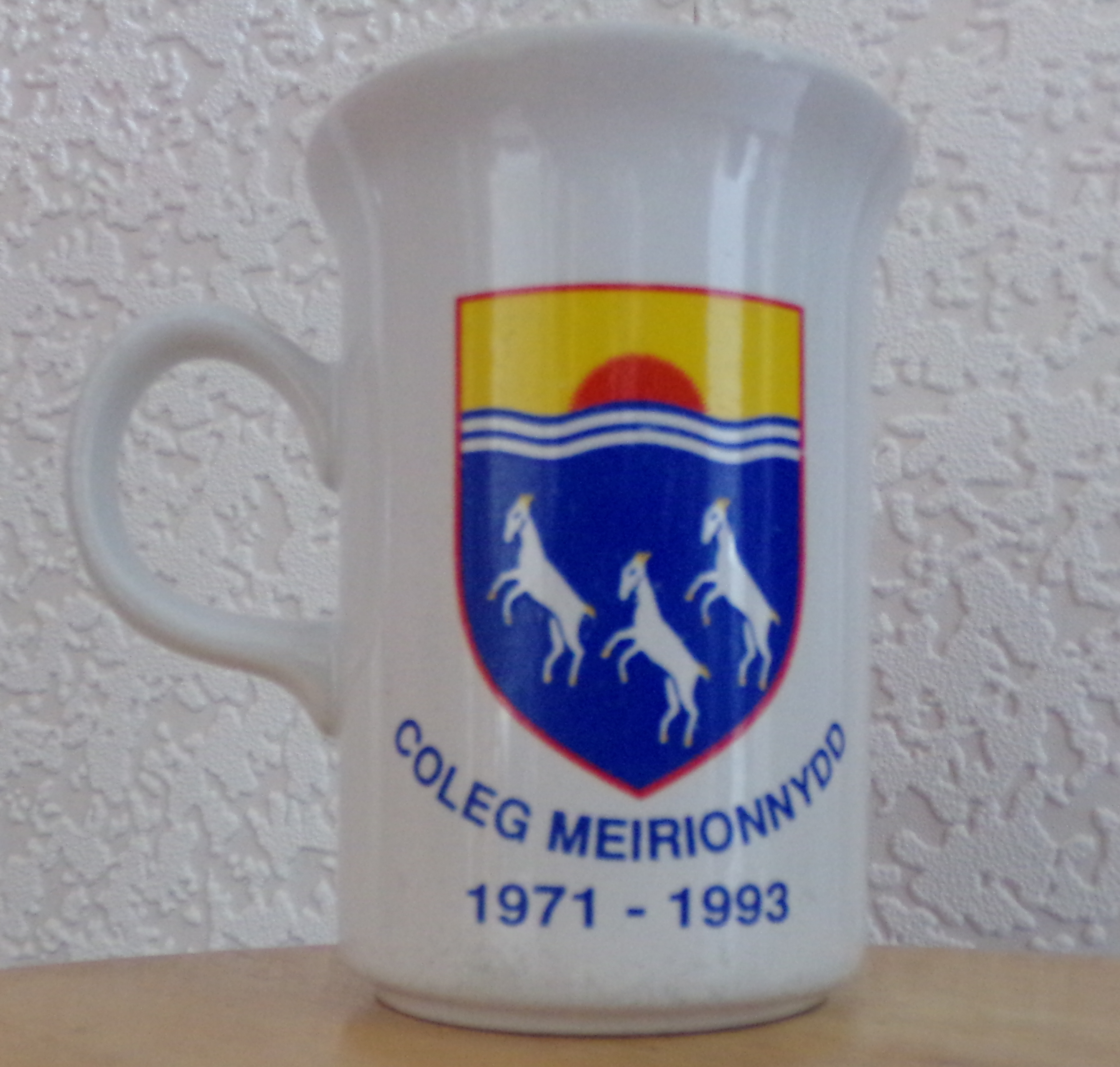 Myg yn dathlu Coleg Meirionnydd ar adeg ei ddarfod i greu Coleg Meirion Dwyfor